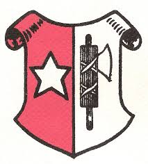 La blazono de Unica kun fasko de 19a jarcento (notu bone sen senco politika fasisto)